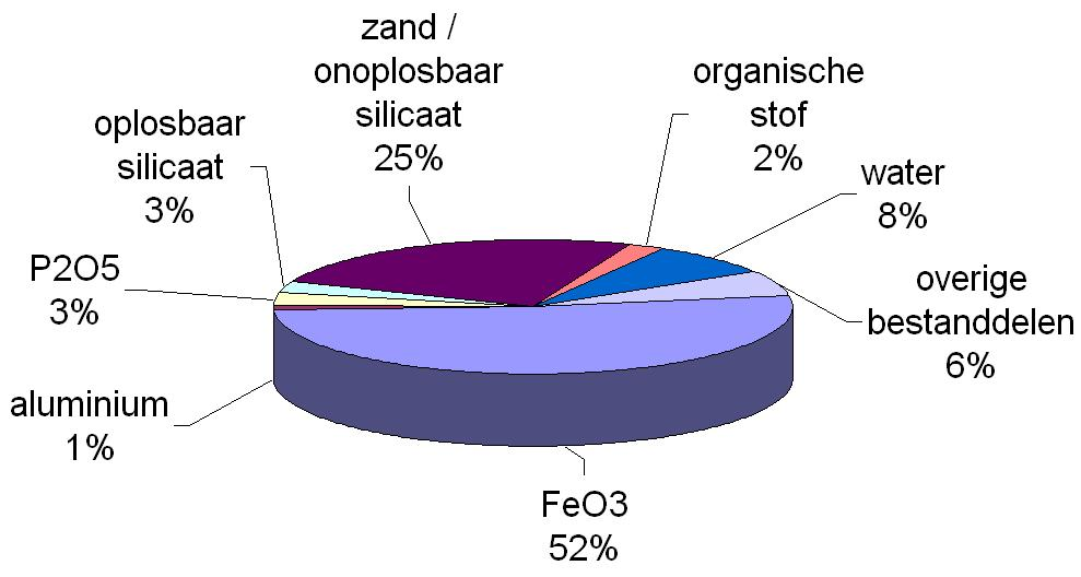 Chemische samenstelling ijzeroer. Eigen gemaakte grafiek